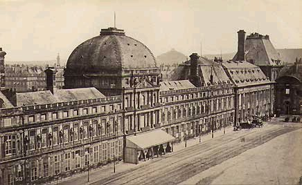 Les Tuileries vues du Louvre, ca. 1865